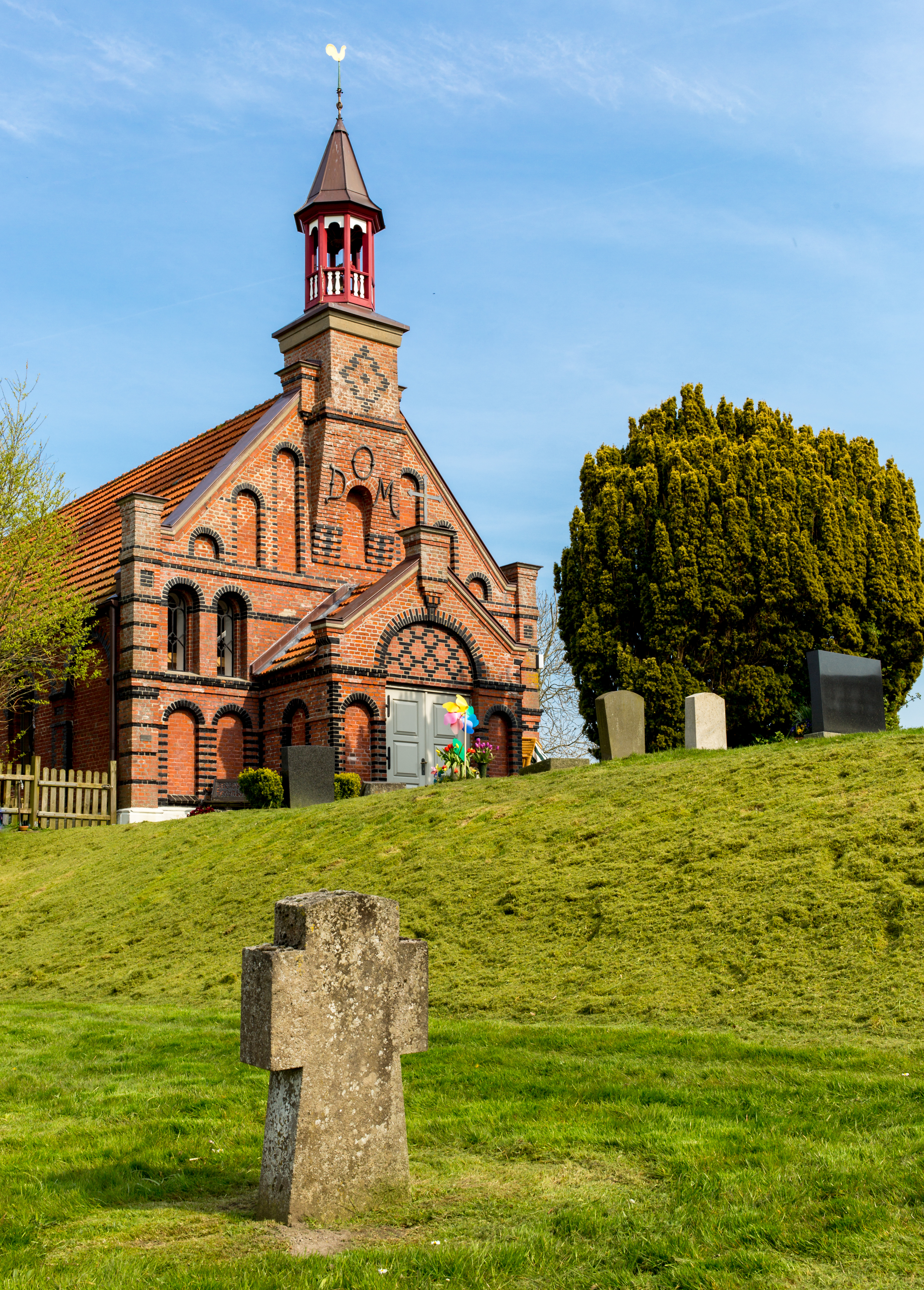 Altkatholische Kirche St. Theresia Nordstrand - Außenansicht Westseite